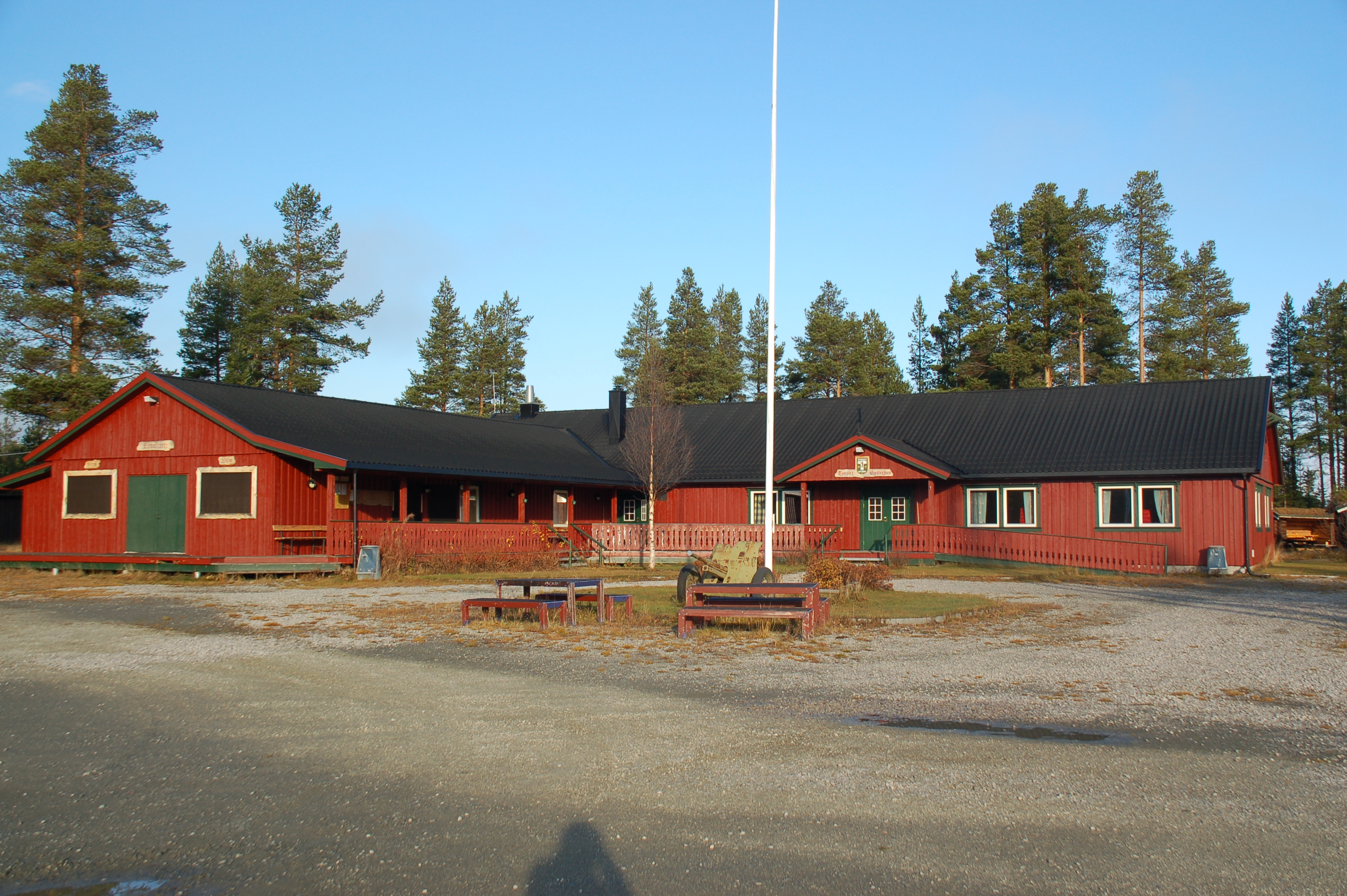 Tynset skytebane